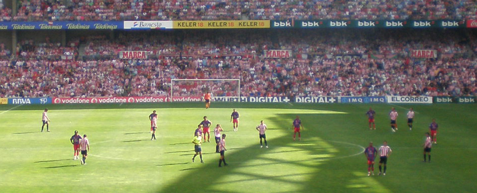 Partido de la ultima jornada de liga entre Athletic y Levante que supuso la salvación para el equipo rojiblancco.